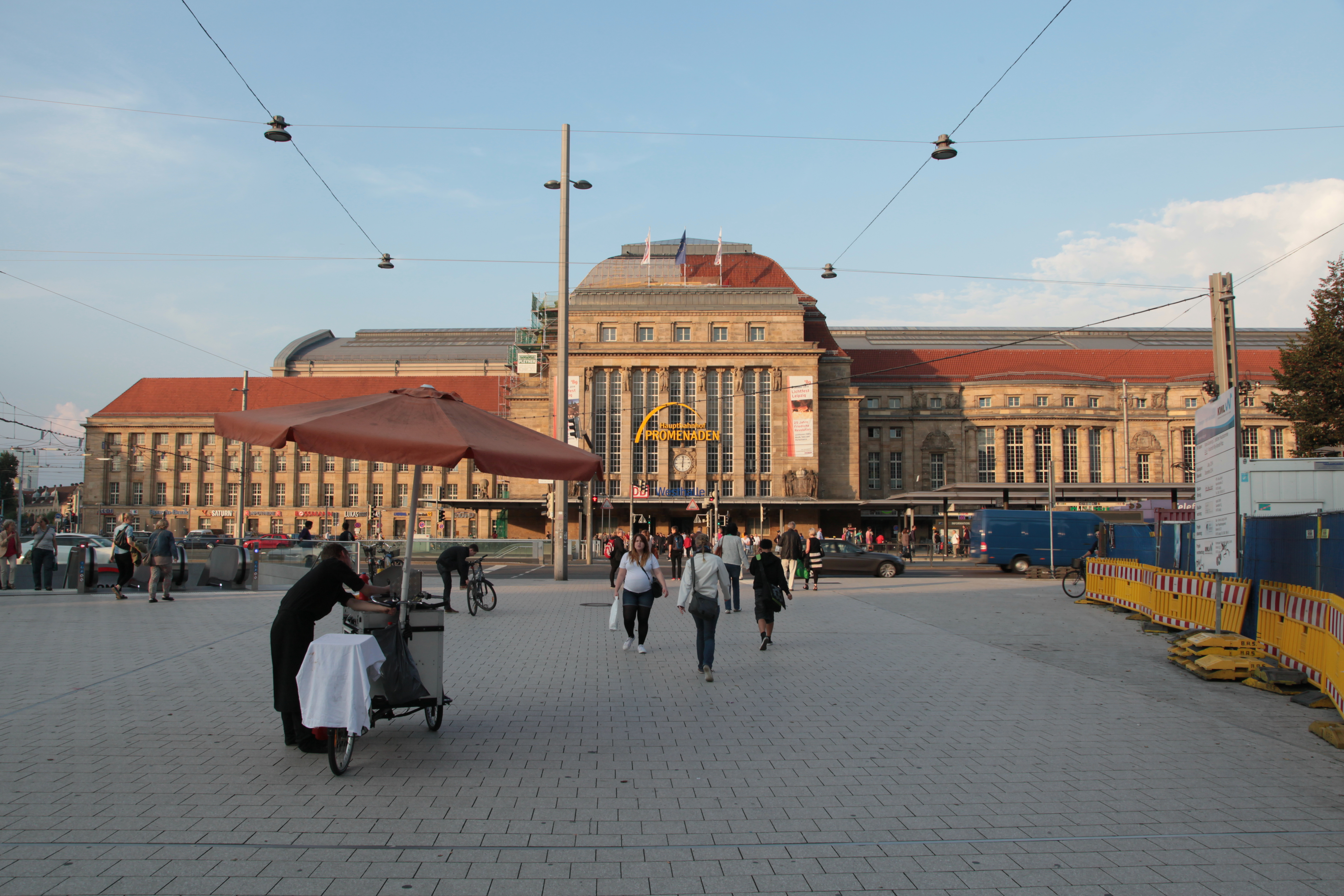 Hauptbahnhof am Willy-Brandt-Platz in Leipzig